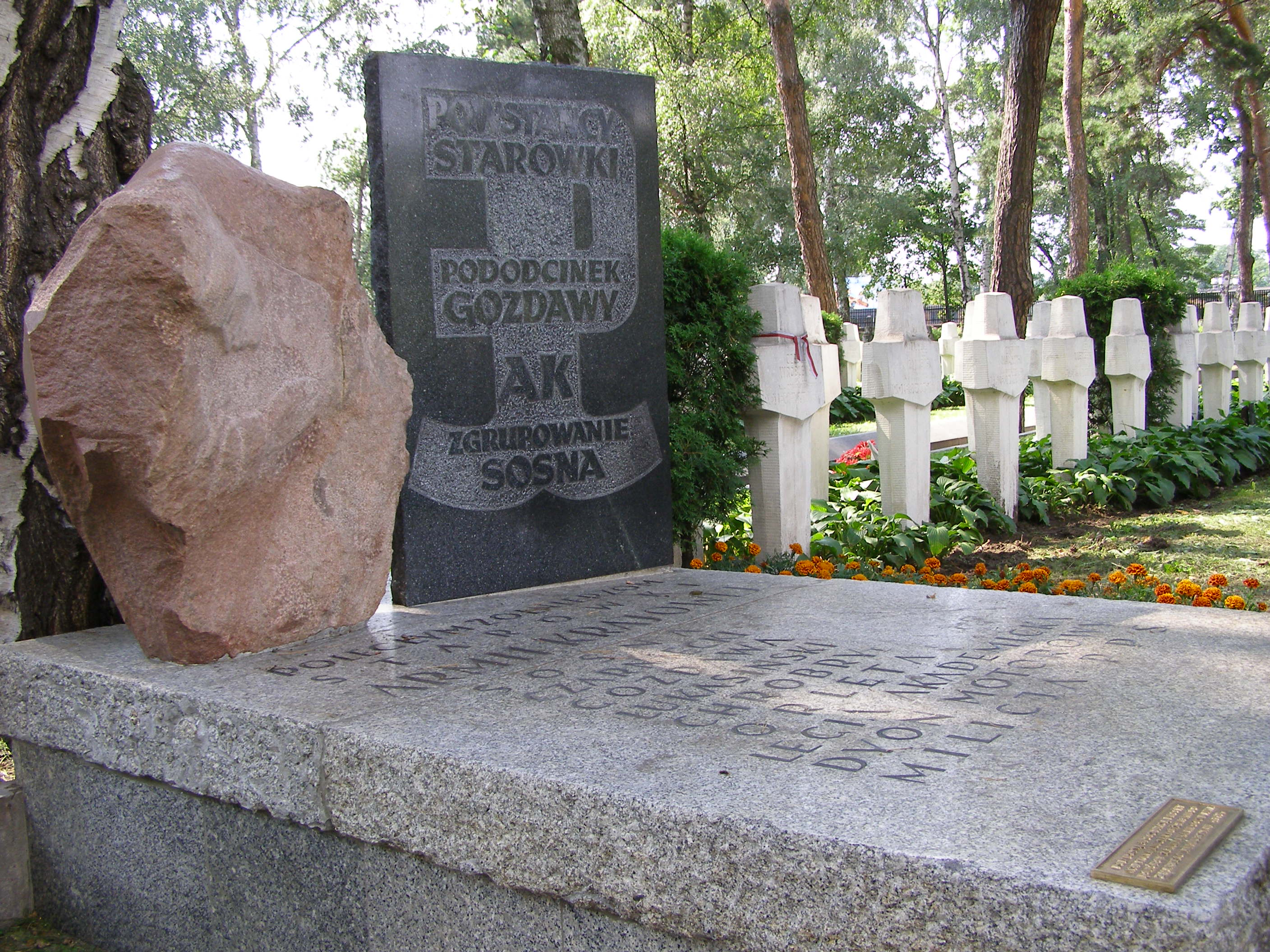 Powązki wojskowe w Warszawie (fot Zu)